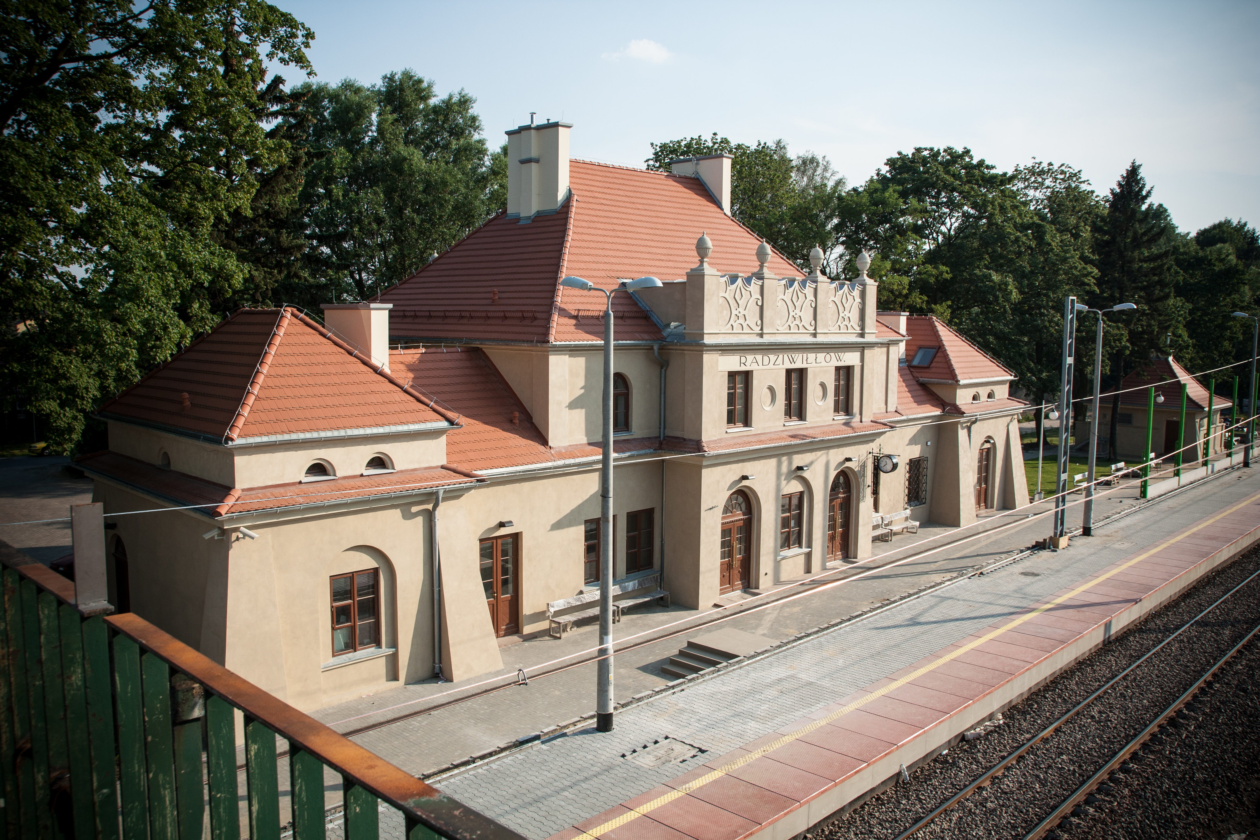 Dworzec kolejowy w Radziwiłłowie